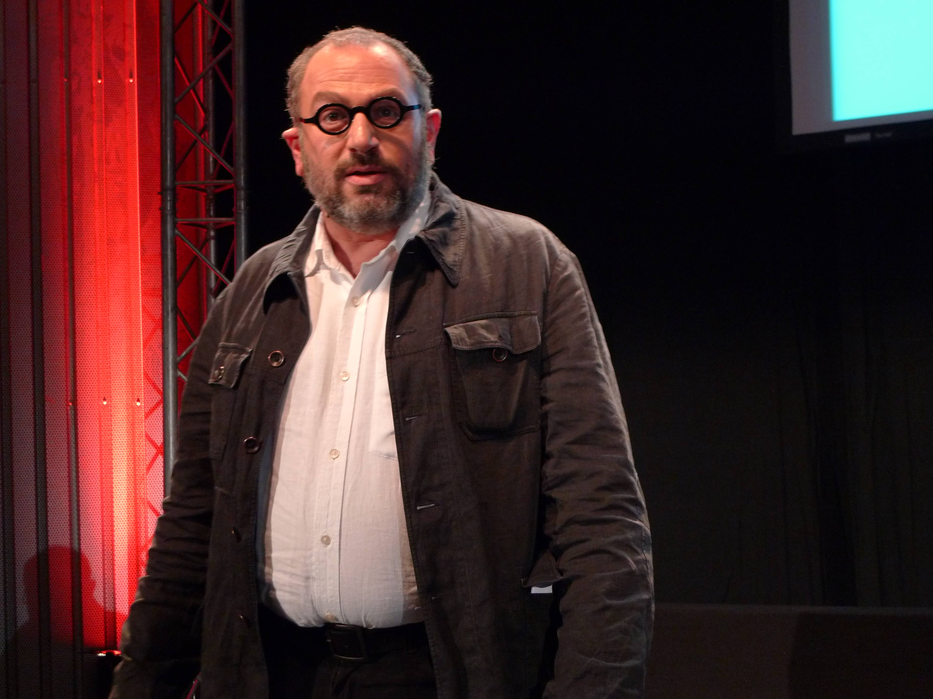 TEDxAlsace : Rafi Haladjian